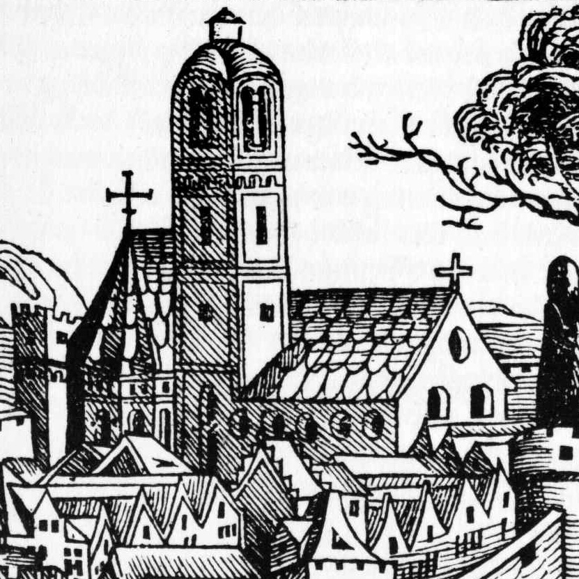 Vermutliche Ansicht der Steyrer Stadtpfarrkirche um oder nach 1450. Detail aus der Schedelschen Weltchronik (Bl. CCLXXVI).[1]